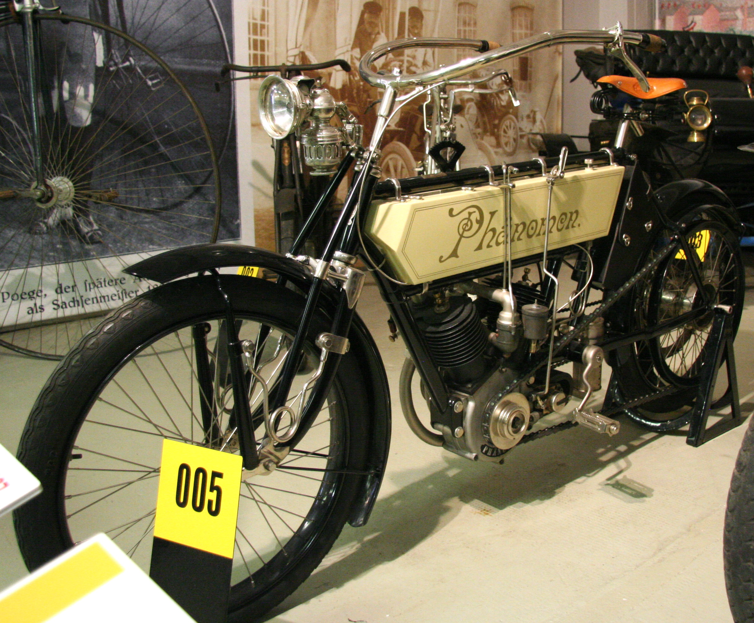 Phänomen 5 1/2 PS, 2-Zylinder V-Motor, 722 cm³, 2-Gang Differentialnabe mit Leerlauf, Zwangskühlung am Motor, Planetenradübersetzung in der Hinterradnabe, Vorderradfederung, Gewicht 120 kg, Baujahr 1907 im Museum für sächsische Fahrzeuge in Chemnitz.